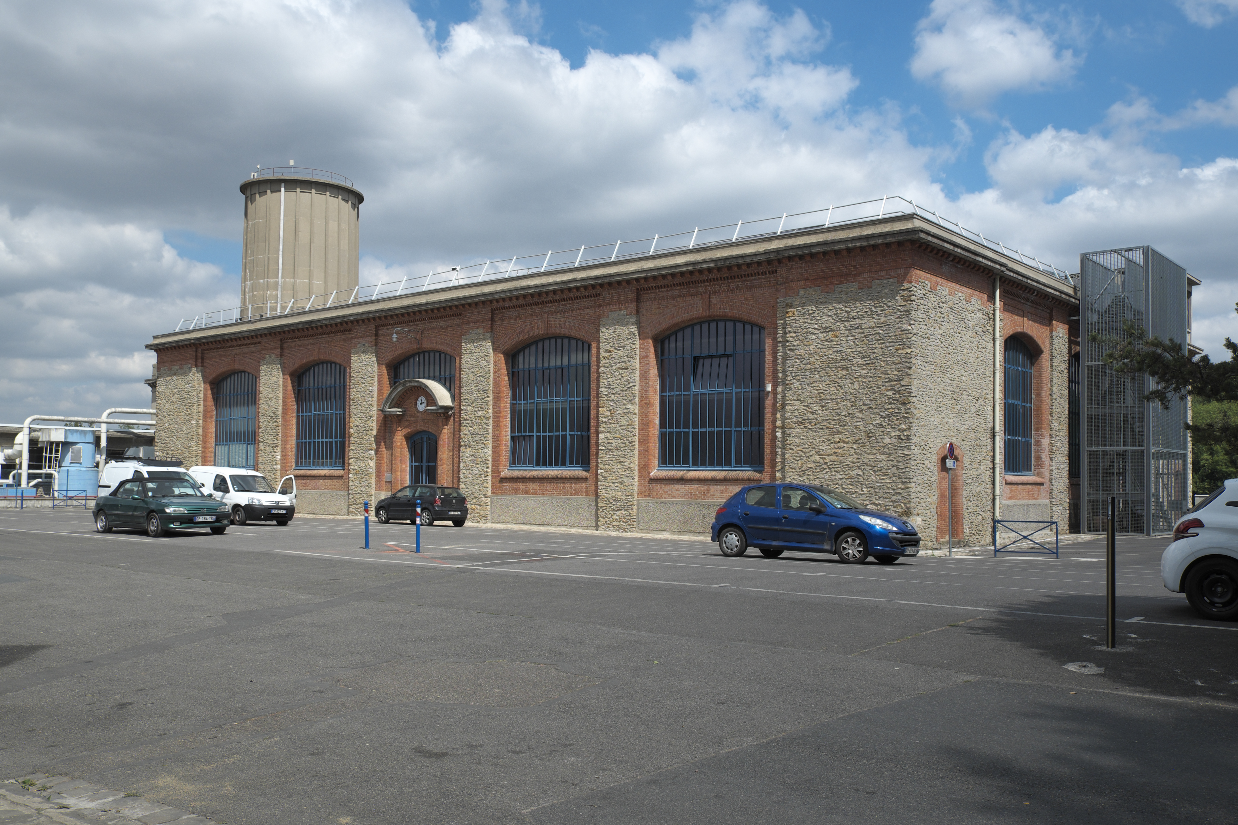 Ehemalige Papier- und Tapetenfabrik Leroy in Saint-Fargeau-Ponthierry im Département Seine-et-Marne (Region Île-de-France/Frankreich)